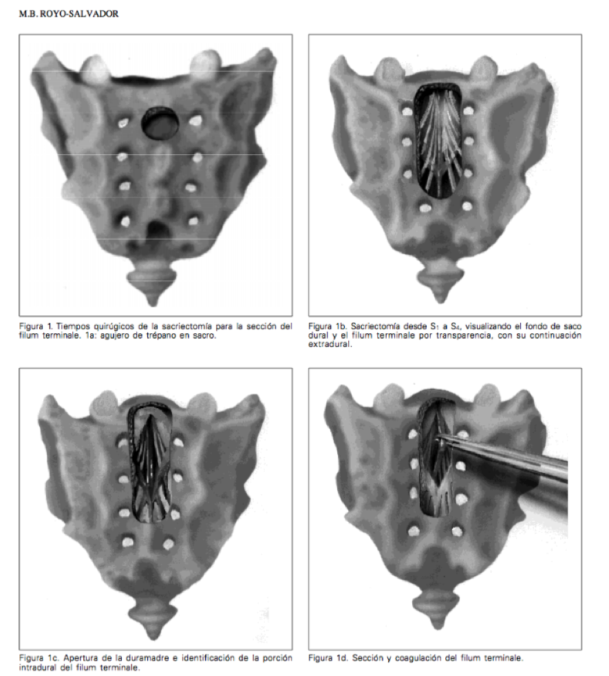 Esquema cortesía de la Chiari & Scoliosis & Syringomyelia Foundation